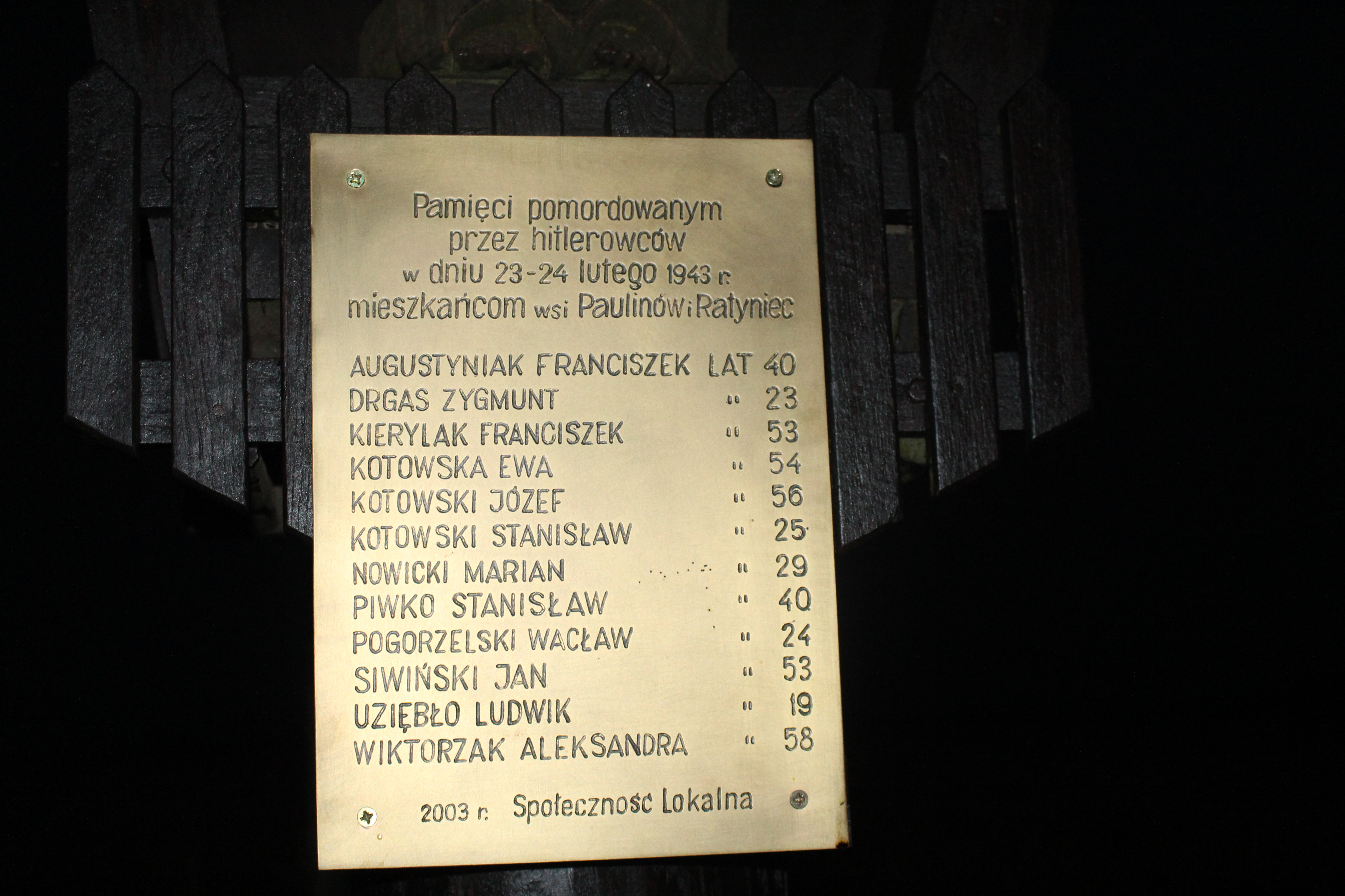 Foto: Kazański Robert, Paulinów, Tablica: Pamięci pomordowanym przez hitlerowców w dniu 23–24 lutego 1943 r. mieszkańców wsi Paulinów i Ratyniec